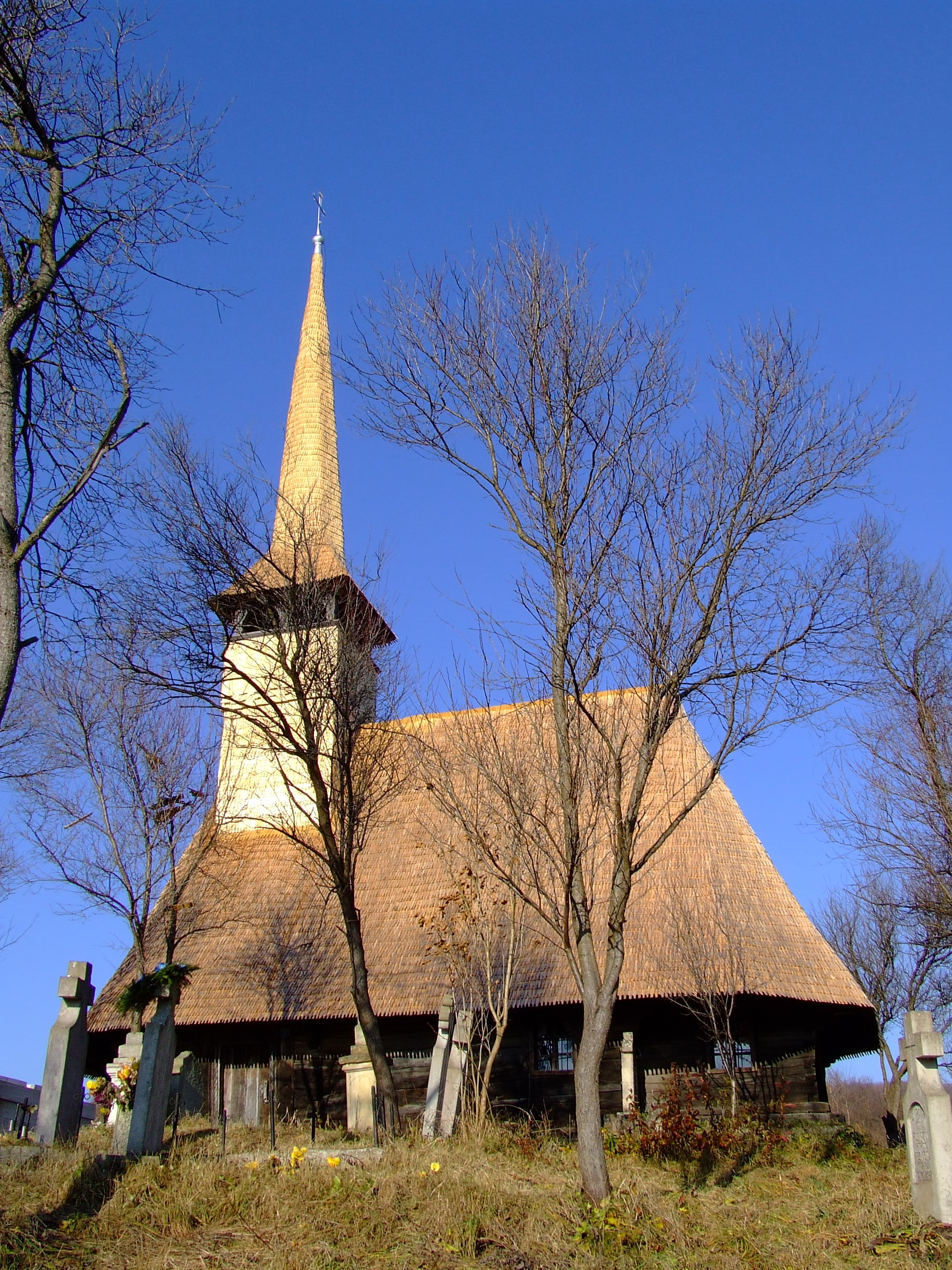 Biserica de lemn din Bârsău Mare